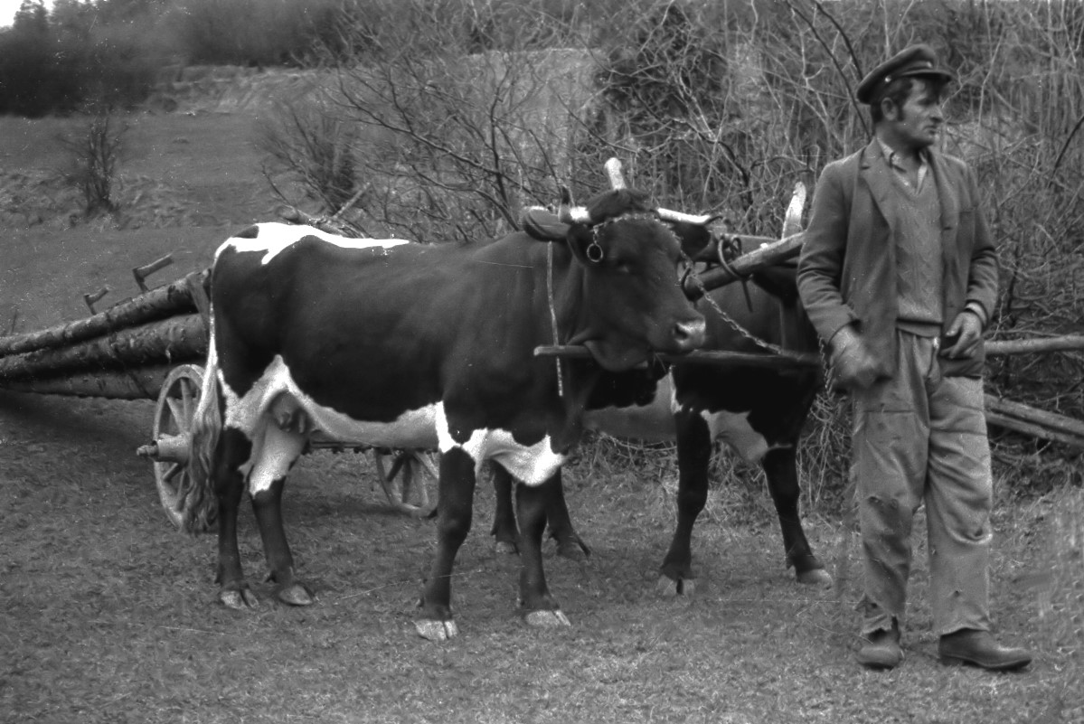 Krowy w zaprzęgu, Słowacja